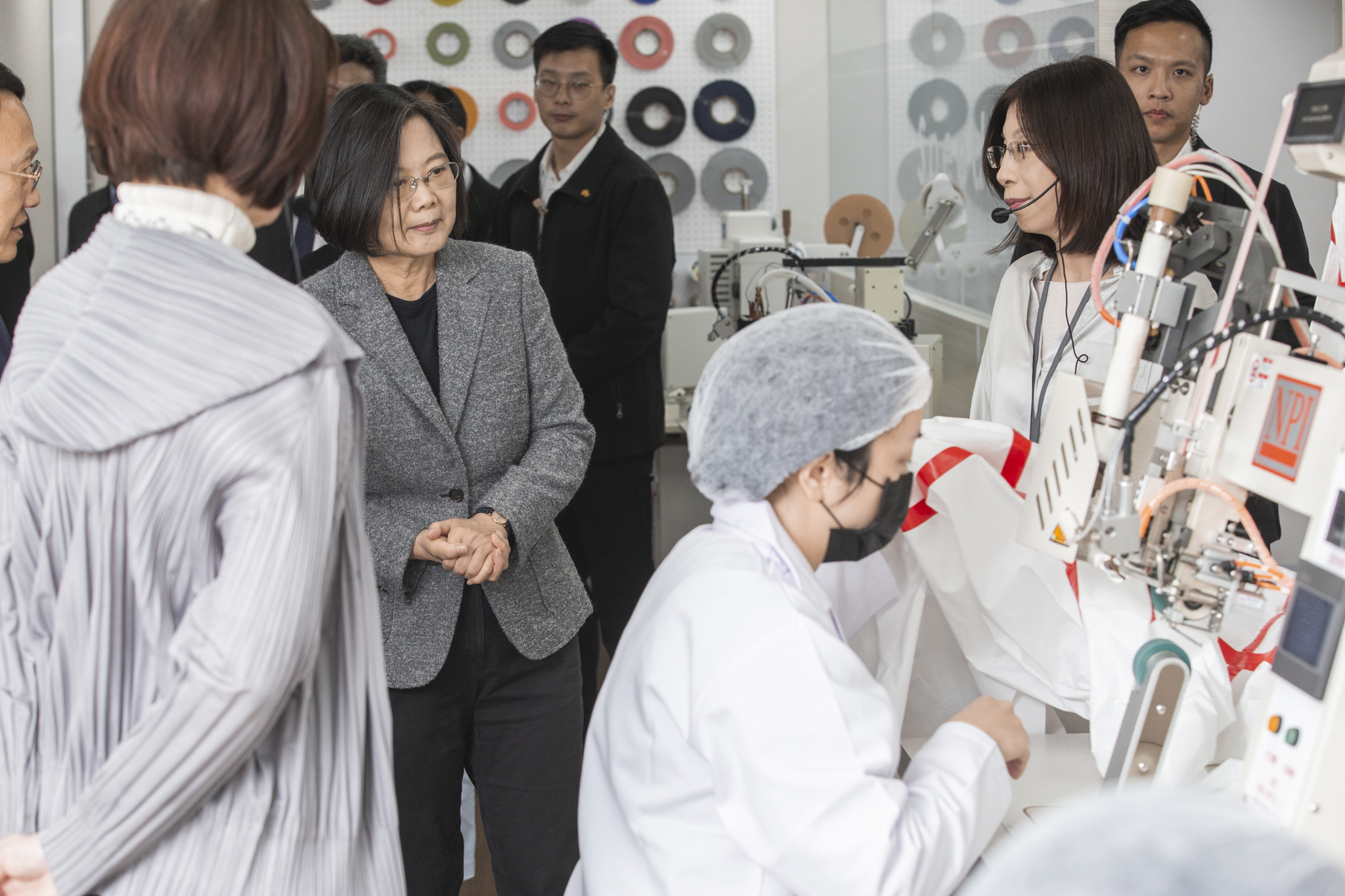 03.16 總統訪視「聚陽實業股份有限公司」